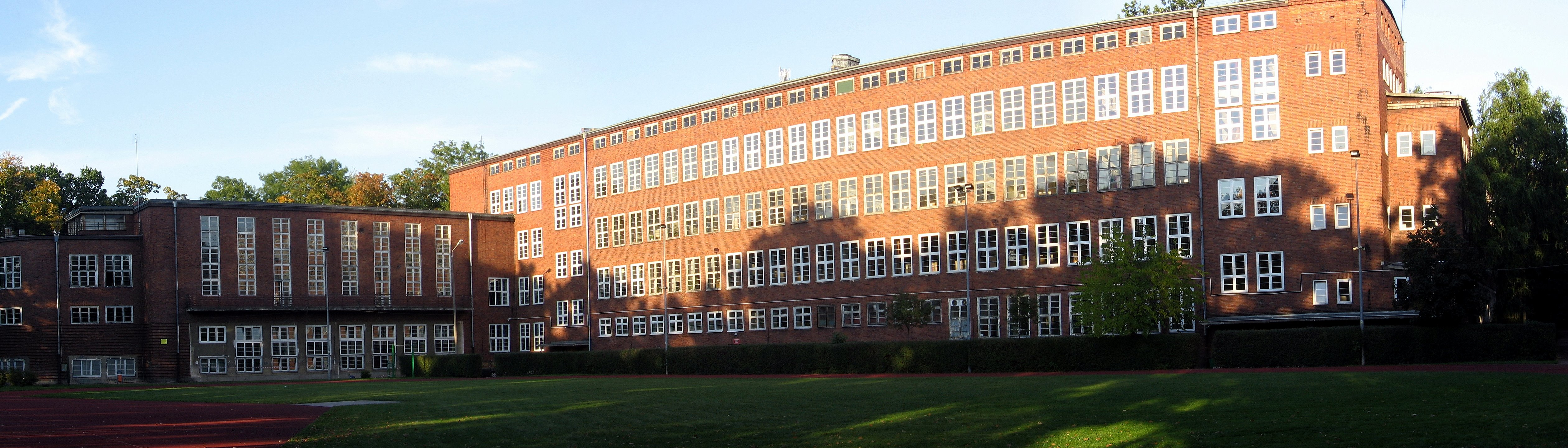 II Liceum Ogólnokształcące we Wrocławiu.